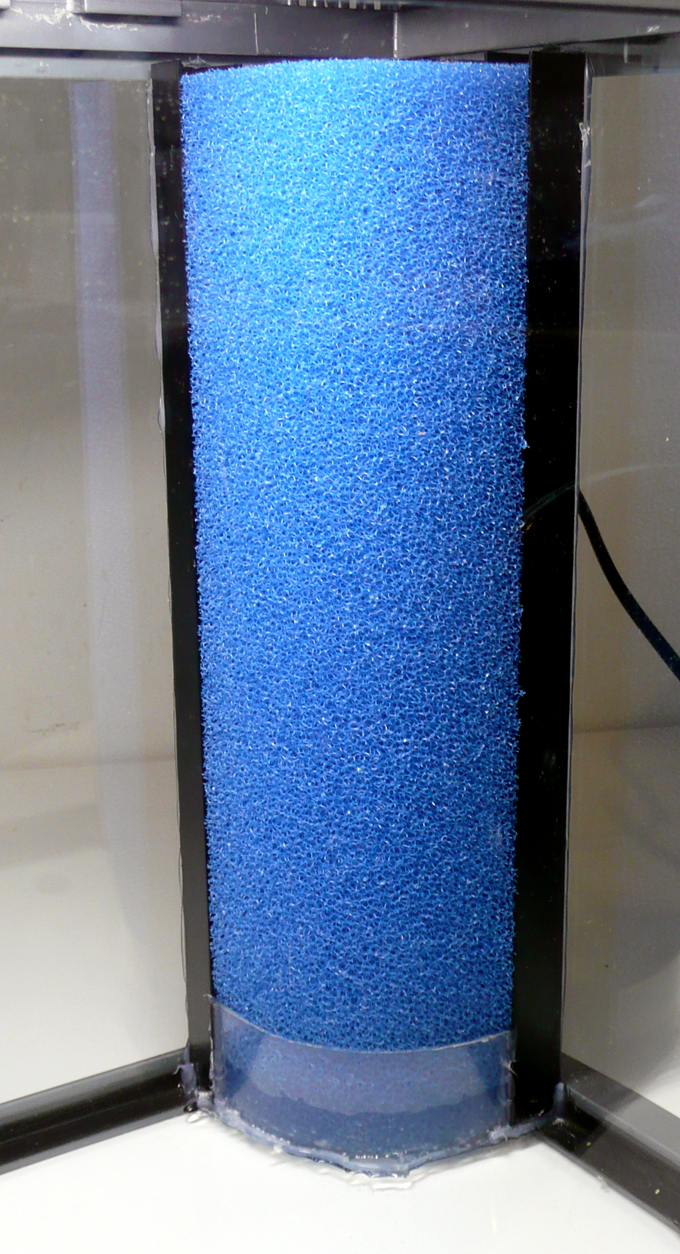 Eck-HMF Aquarienfilter mit Sand/Kiessperre und U-Form Führungsschienen (aus 2 L-Profilen). Nachträglich montiert in einem Tetra AquaArt 30L Aquarium. Technische Daten: Radius = 9cm Höhe = 33cm Filterfläche = ca. 350 cm² Mattendichte: Fein Mattenstärke: 2 cm